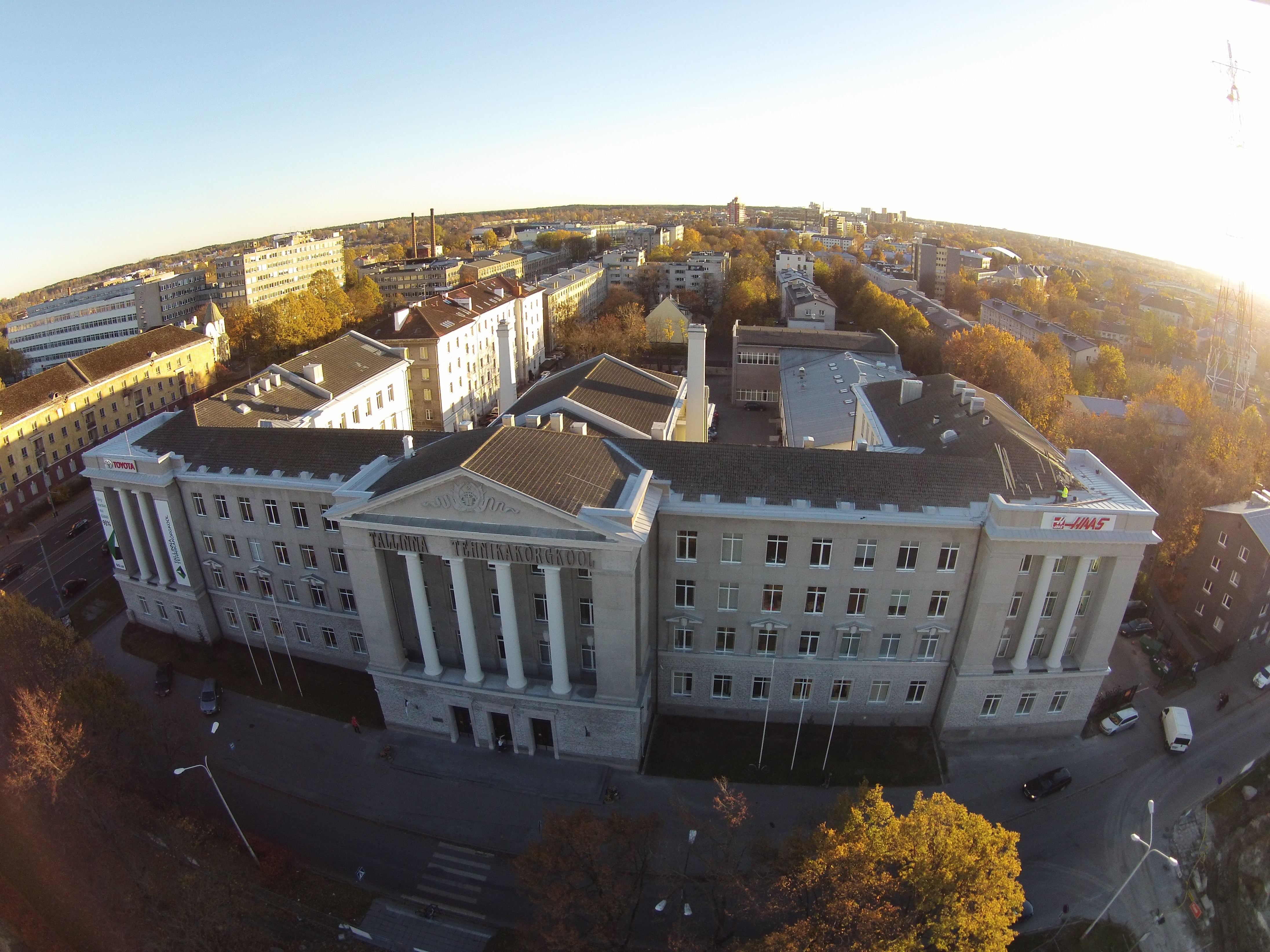 Tallinna Tehnikakõrgkooli peahoone õhust.